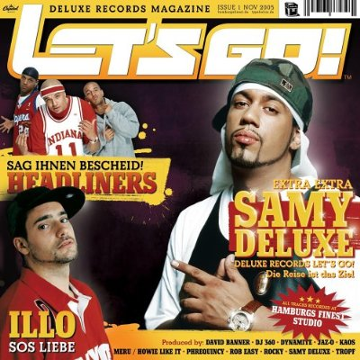 Cover des Samplers „Deluxe Records – Let’s Go!“